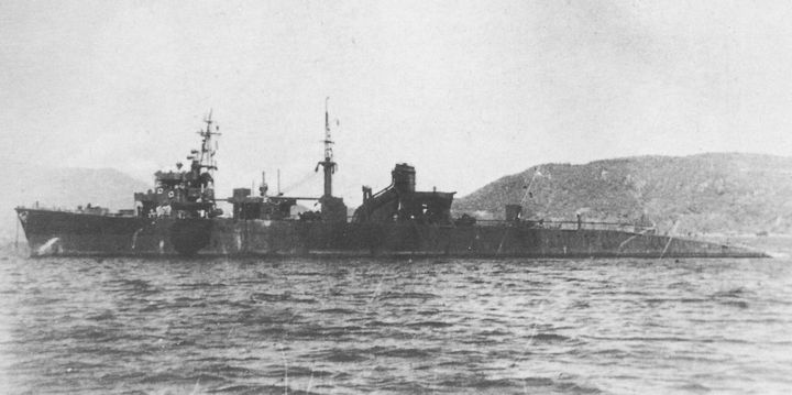 復員庁特別輸送艦『輸第十六号』（元日本海軍第一号型輸送艦『第十六号輸送艦』）、佐世保沖